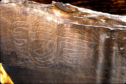 Gravure préhistorique du sud-oranais